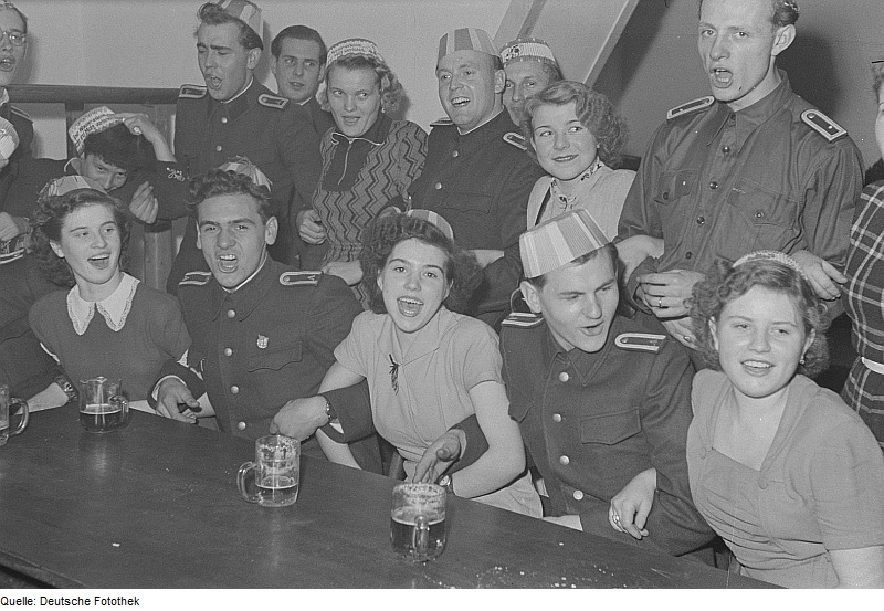 Original image description from the Deutsche Fotothek Kursanten und Partnerinnen beim Singen und Schunkeln auf einer Feier von Mitgliedern der Freien Deutschen Jugend des VEB Eisenbau und der Volkspolizei in der Turnhalle der BSG Motor Mockau